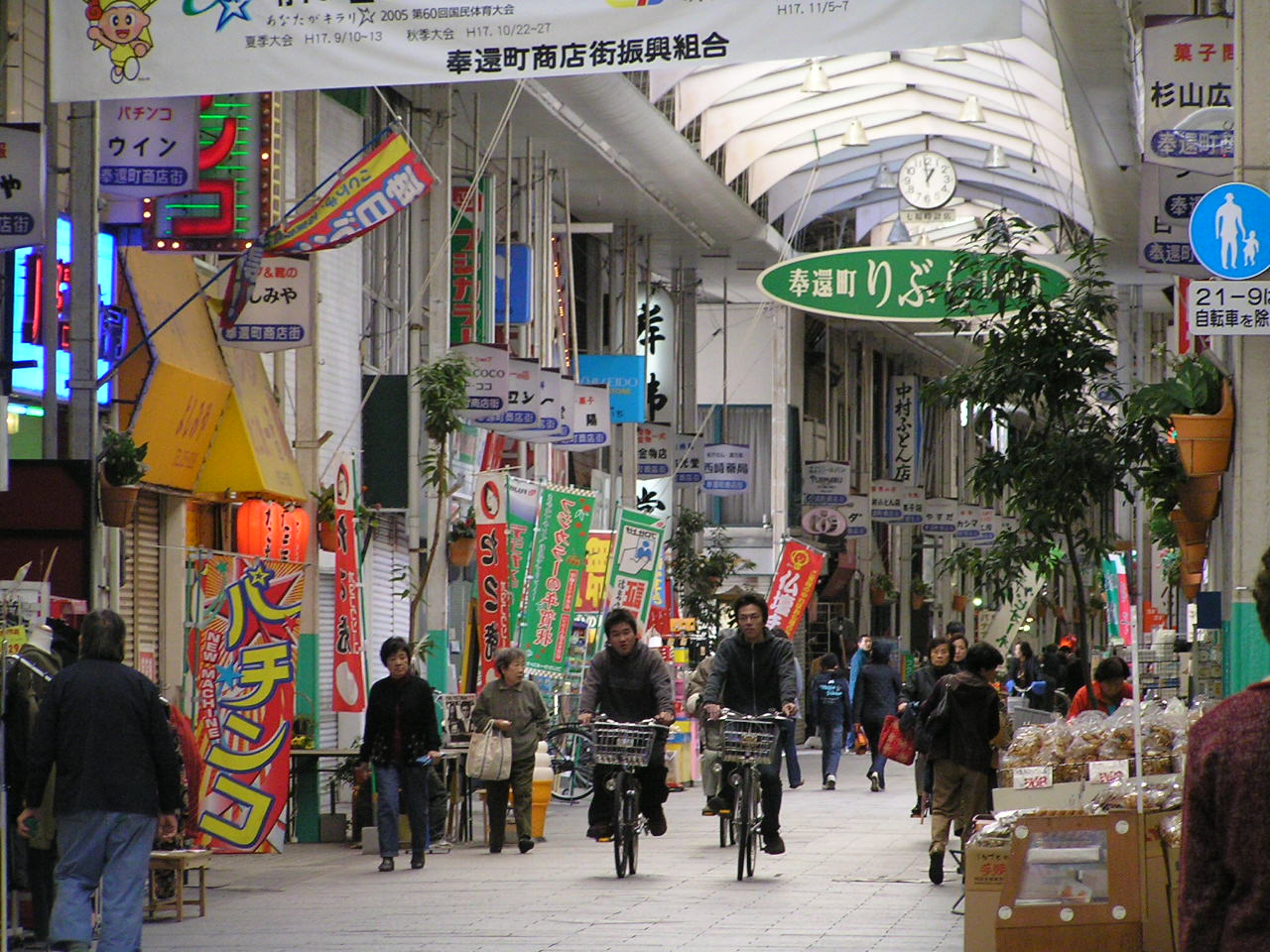 hokancho